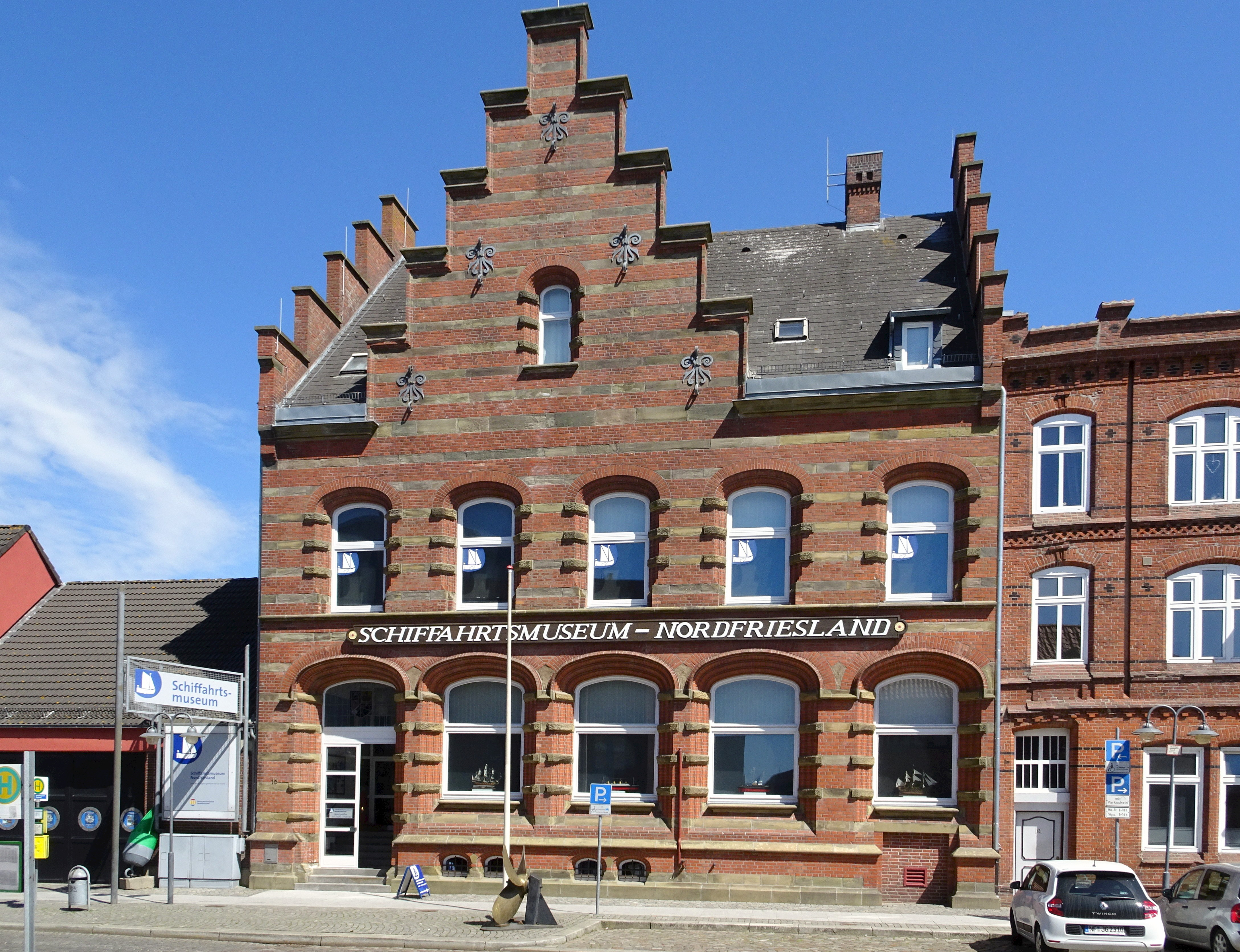 Schiffahrtsmuseum Nordfriesland, Fassade